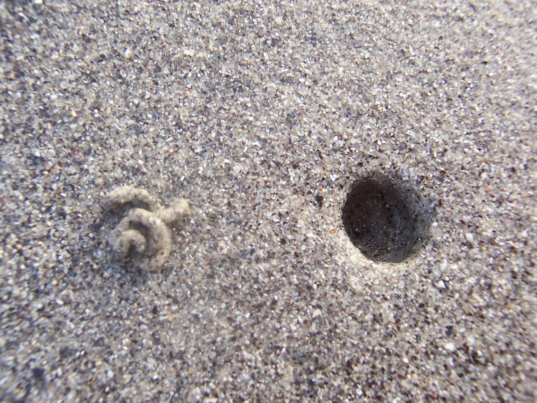 Trou d'Arenicola marina visible sur une plage de Concarneau